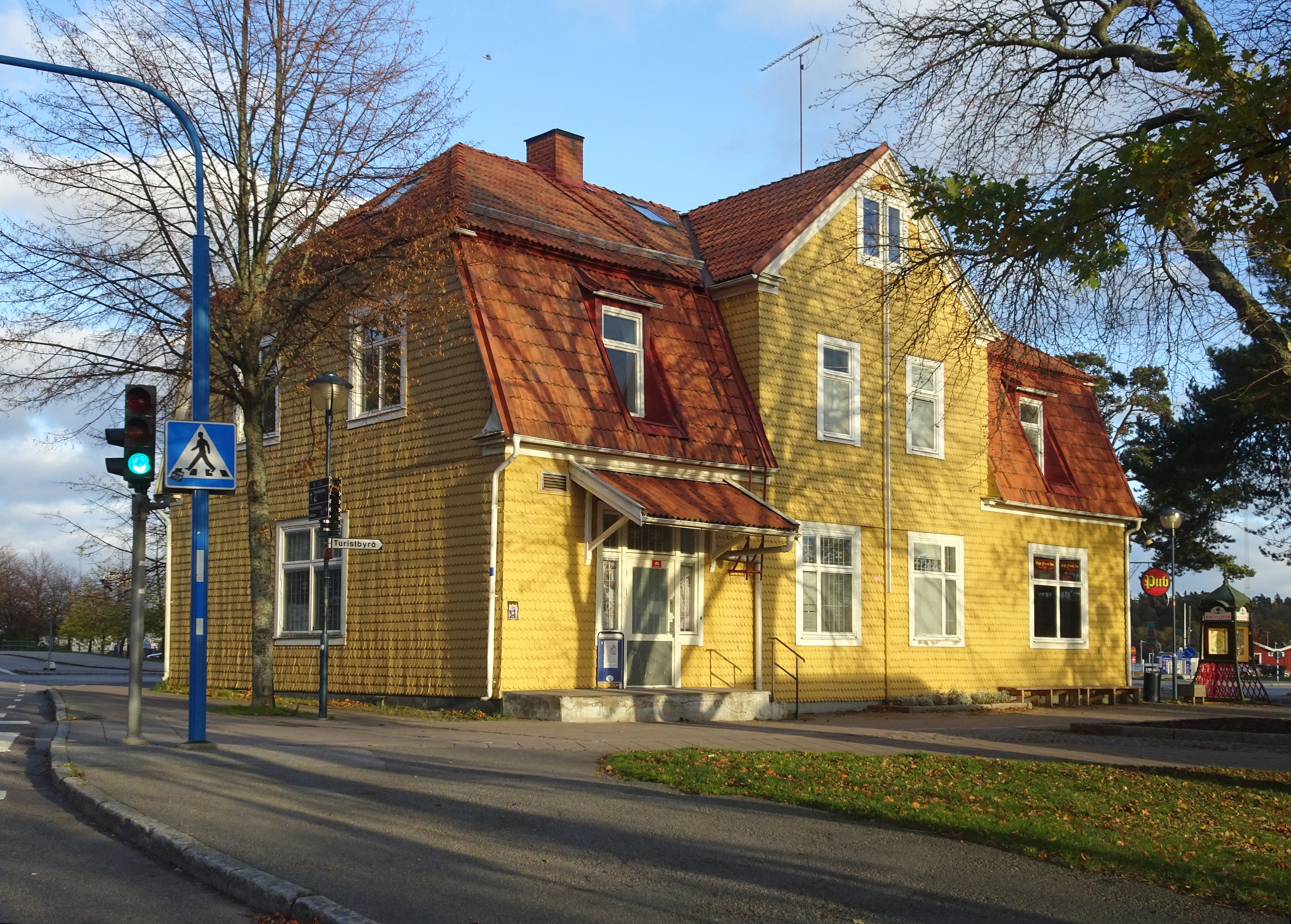 Nynäshamns gamla stationshus, arkitekt Ferdinand Boberg